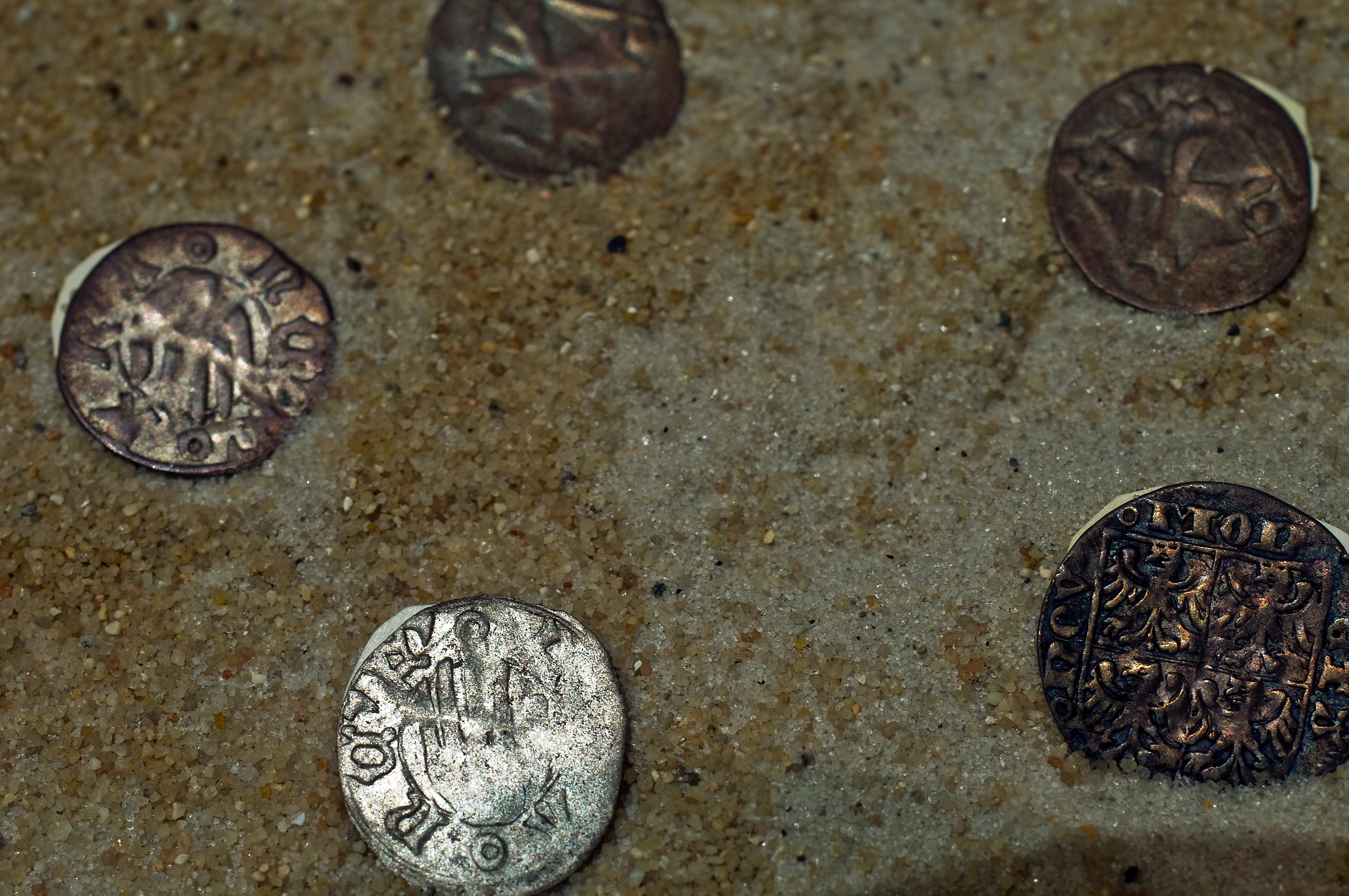 Historisches Museum Frankfurt am Main Münzen Heller aus dem 15. Jahrhundert